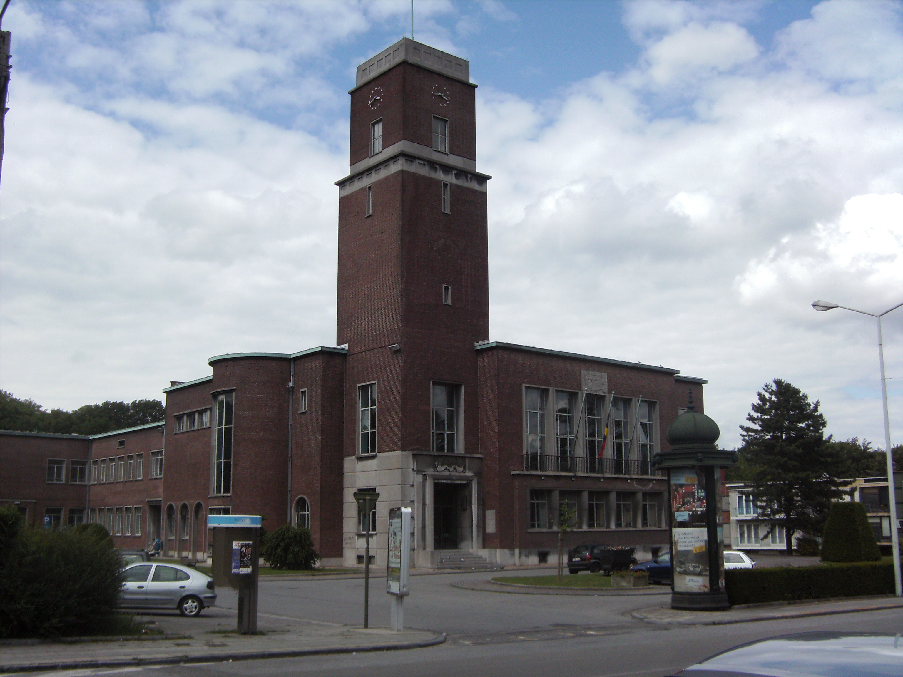 Marcinelle (Charleroi-Belgique) - avenue Mascaux - Hôtel de Ville. Architecte Joseph André.